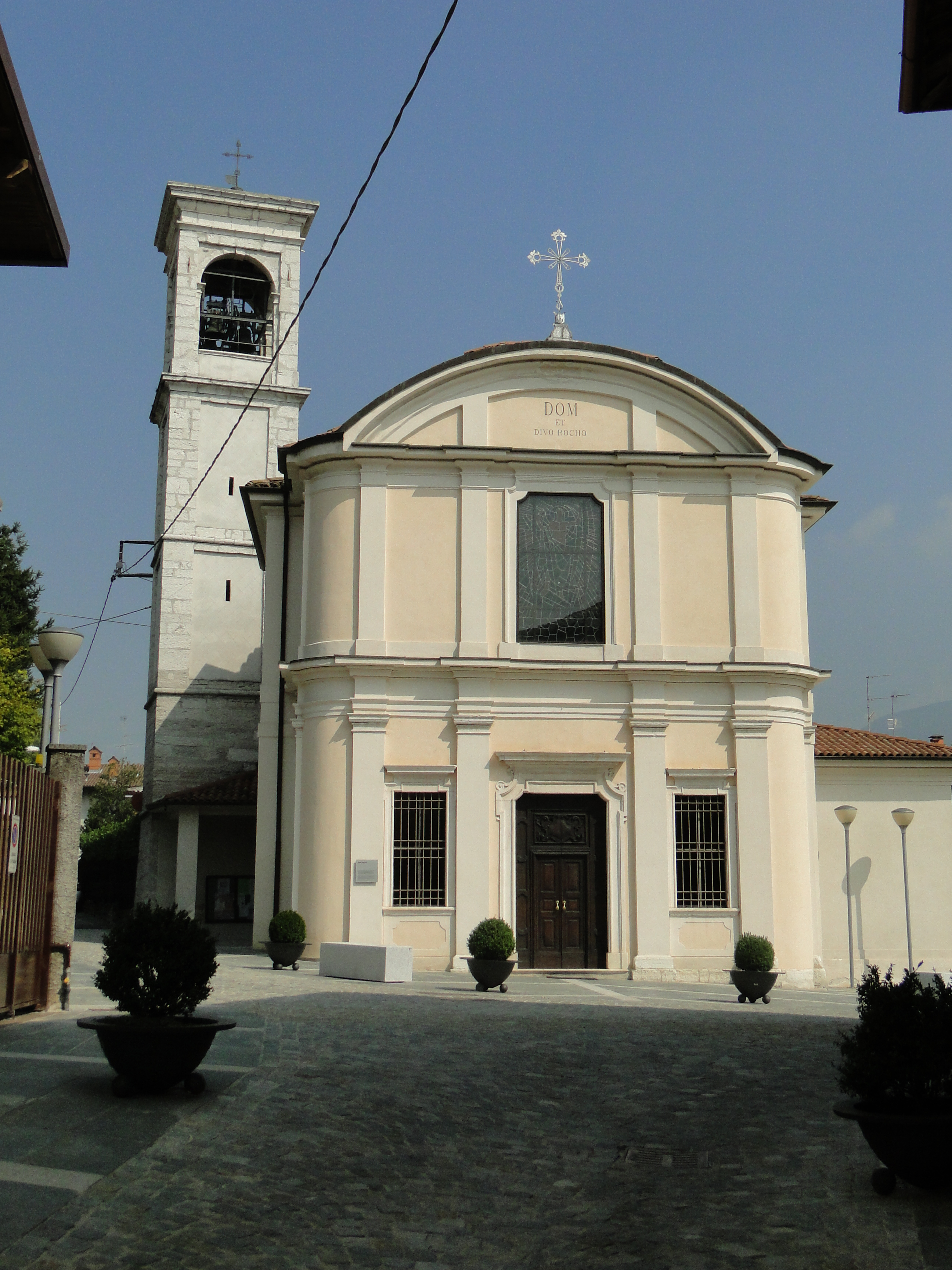 Chiesa di San Rocco, Viana di Nembro (BG)